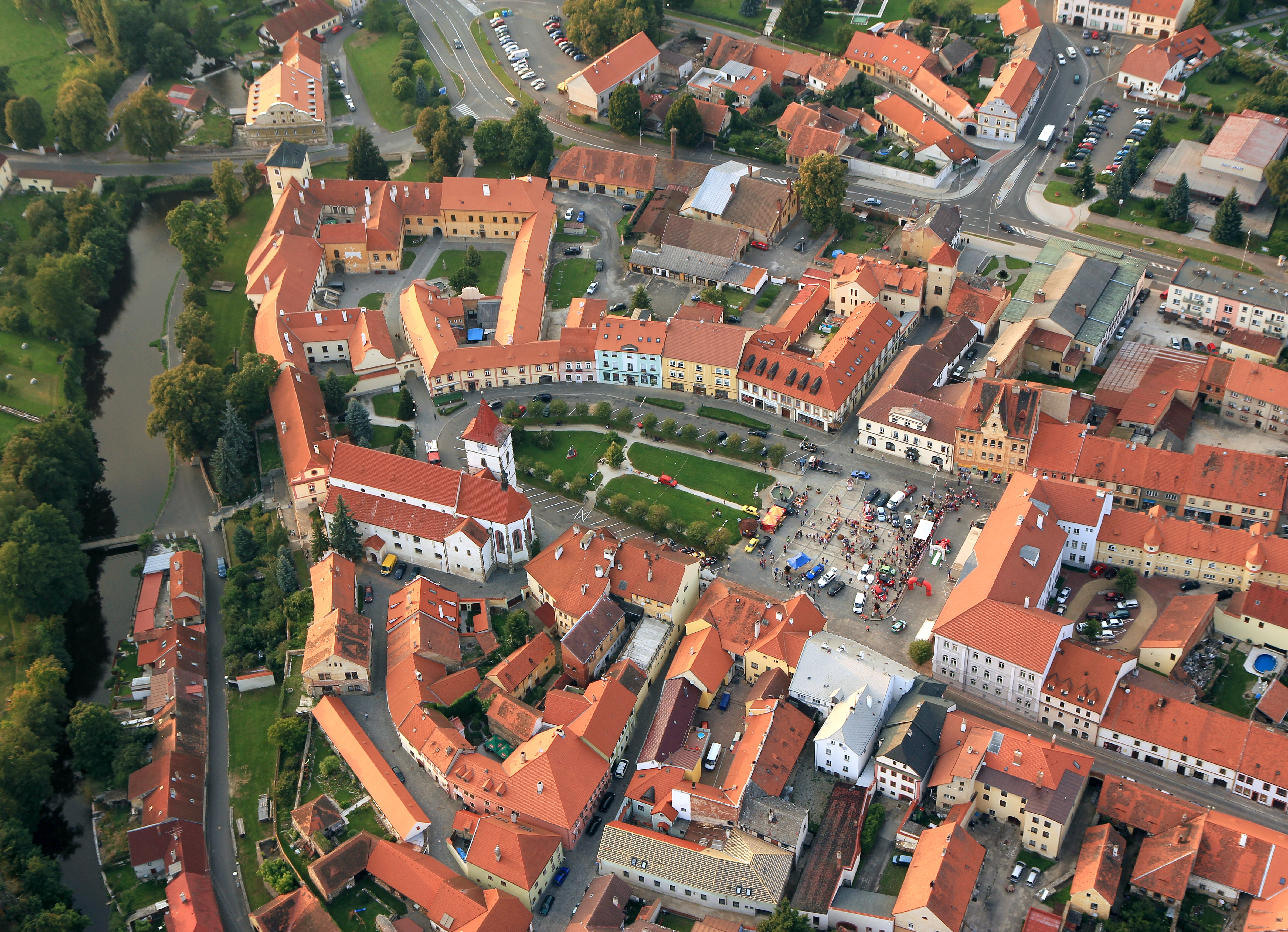 Kostel sv. Petra a Pavla (Horažďovice), Mírové nám., Horažďovice